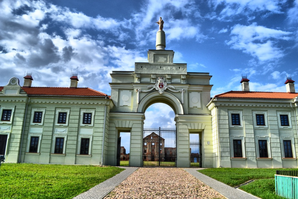 Беларуская (тарашкевіца): Рэшткі былога палацавага комплексу: фрагмэнты галоўнага і ўсходняга карпусоў; уязная брама; флігелі; аркады. г. п. Ружаны This is a photo of Belarusian heritage monument. Reference number: 112Г000640 ( WLM)